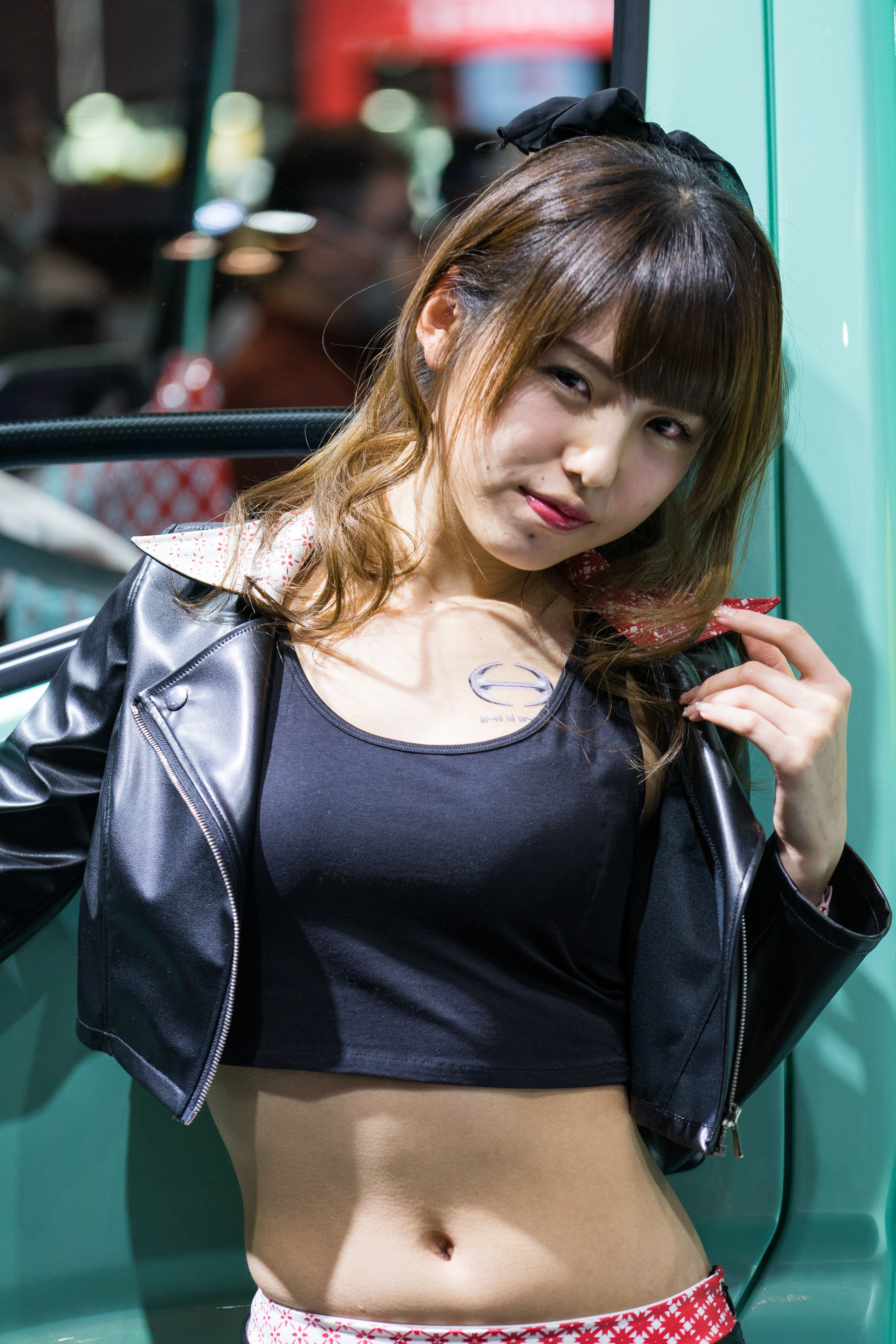 TOKYO AUTO SALON 2017 （東京オートサロン2017）-45.jpg